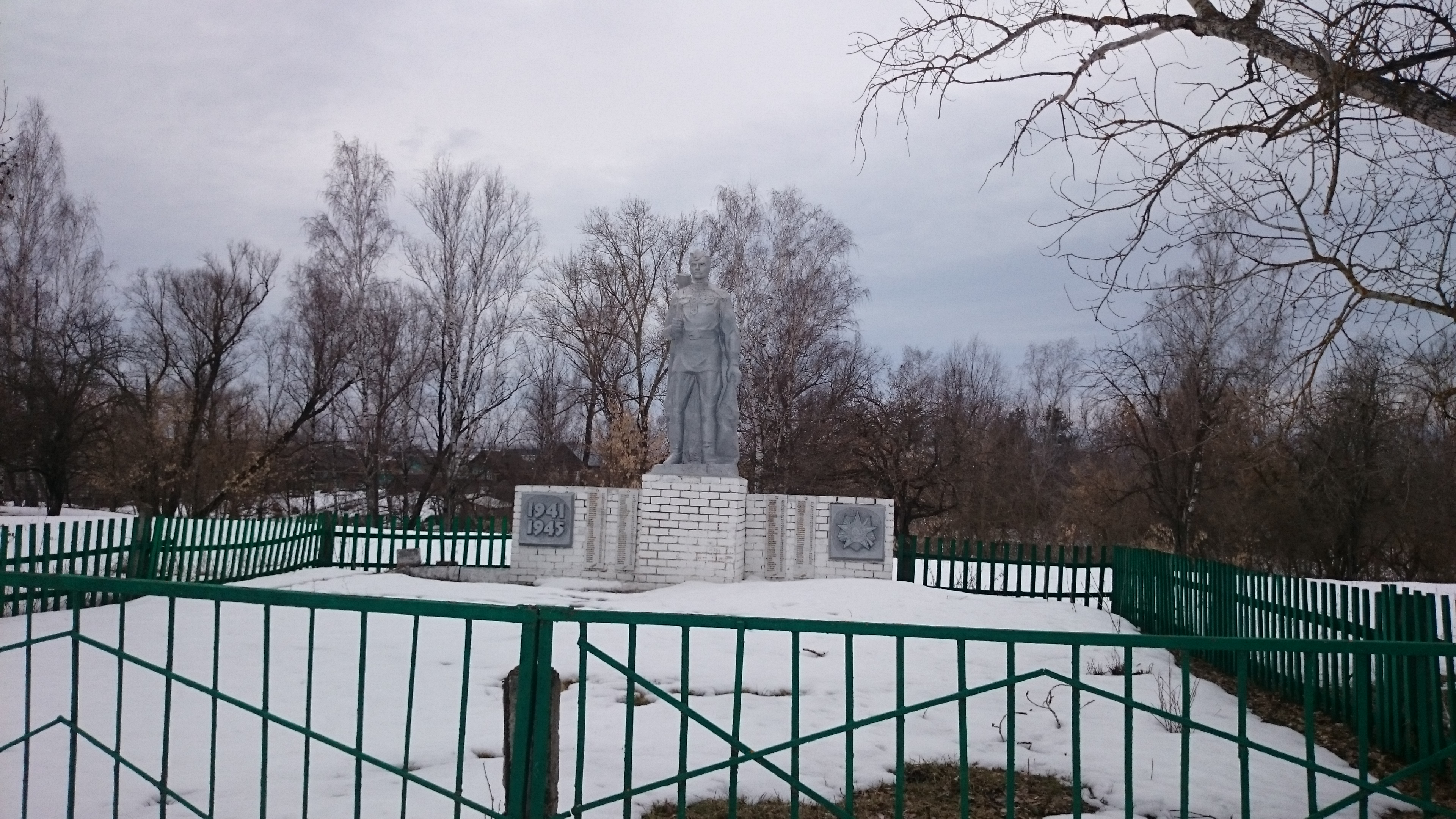 Кольцовка